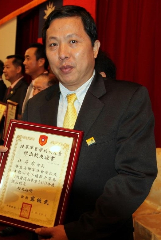 陸官傑出校友表揚-杜昇泉獲獎